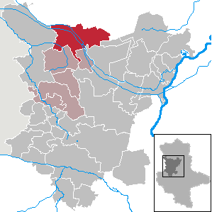 Calvörde in Saxony-Anhalt (Country) - District (Landkreis) Börde